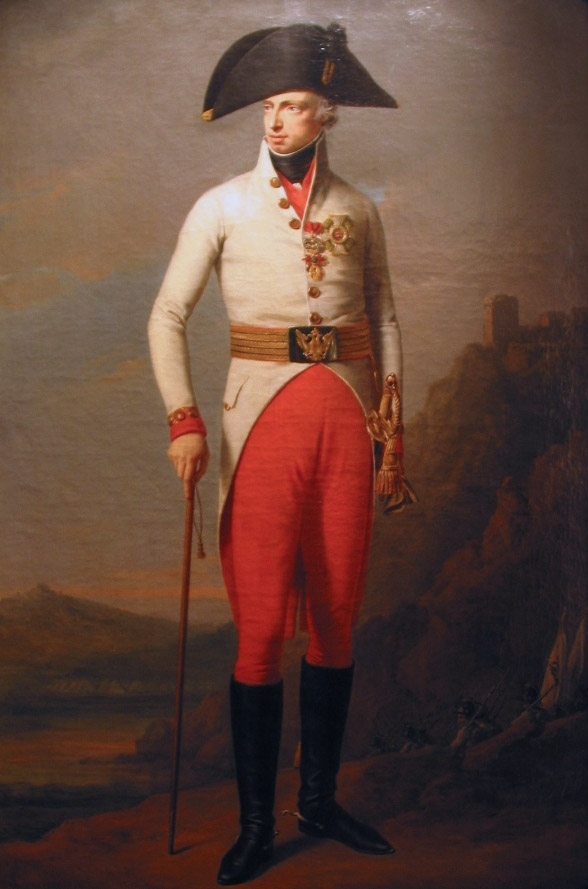 Porträt Erzherzog Karllabel QS:Lde,"Porträt Erzherzog Karl"